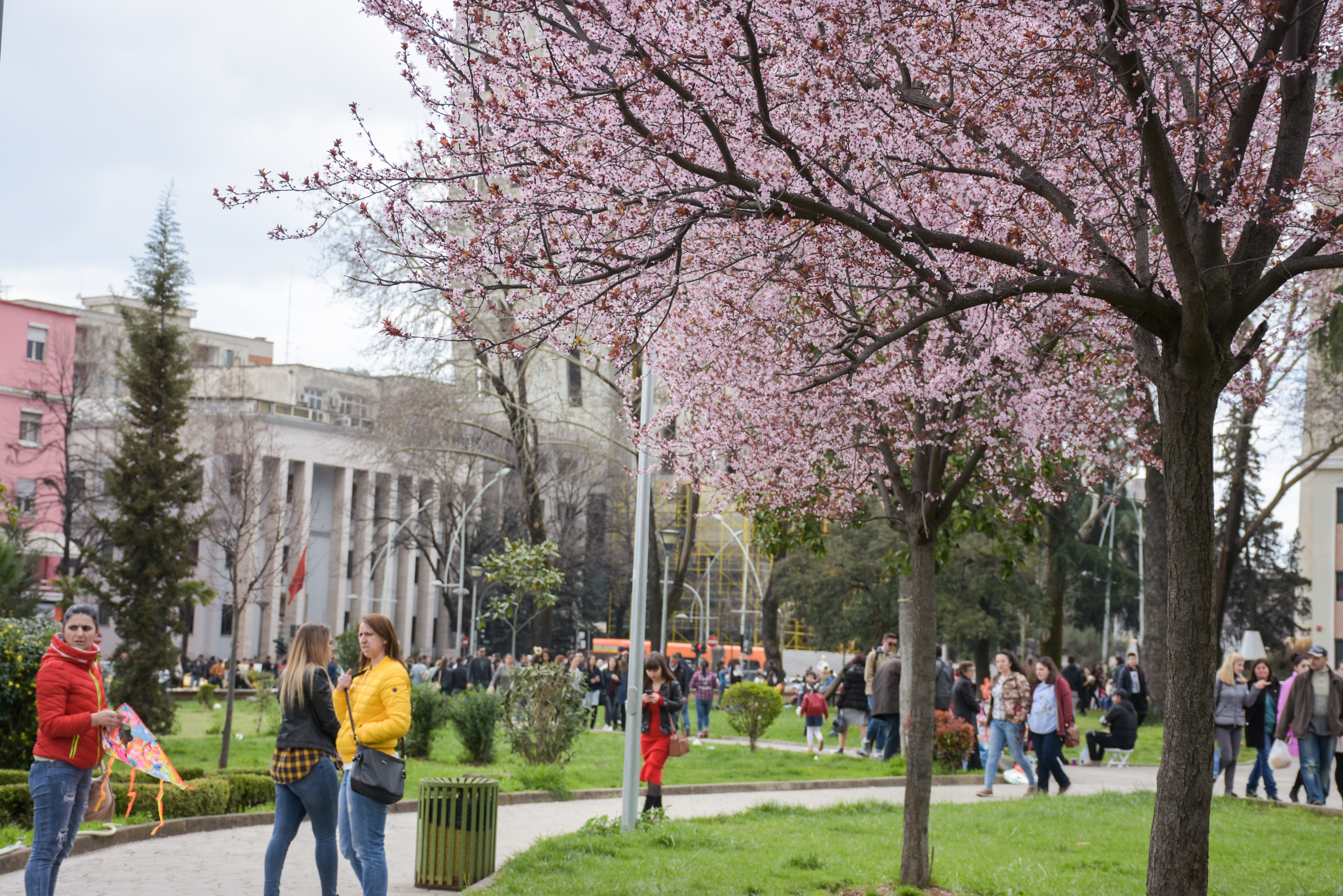 Parku " Rinia" (Tiranë). Foto: Ivana Dervishi